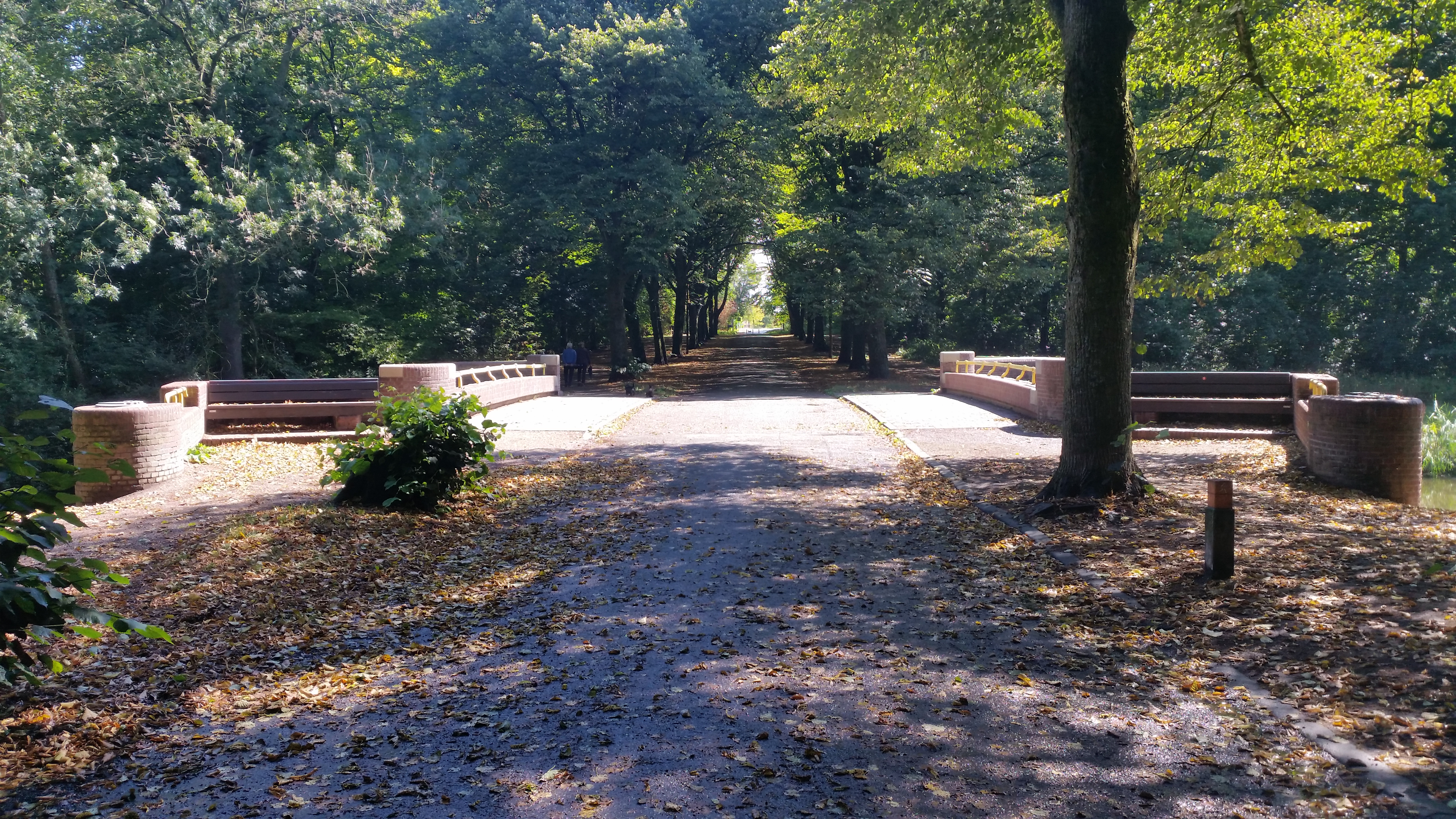 Overzicht over Brug 543 (in Amsterdam)